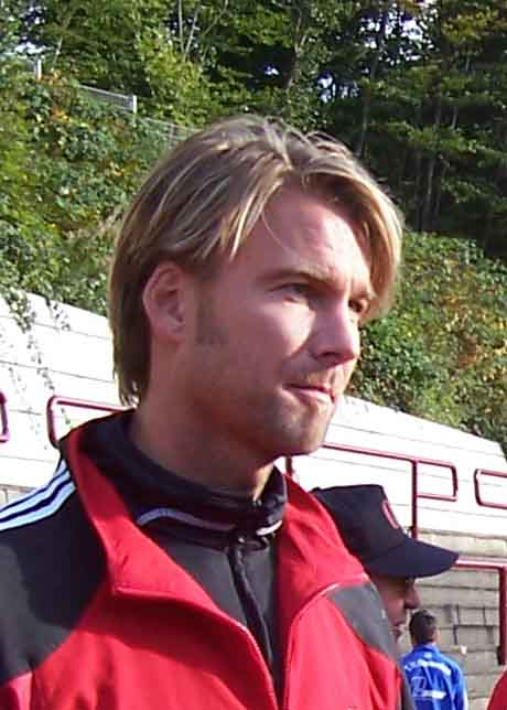 Bild von Lars Leese für den Artikel Lars Leese, Portrait Ort: Gummersbach, NRW, Deutschland